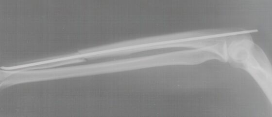 Röntgenbild eines Unterarms mit Marknagel in der Elle